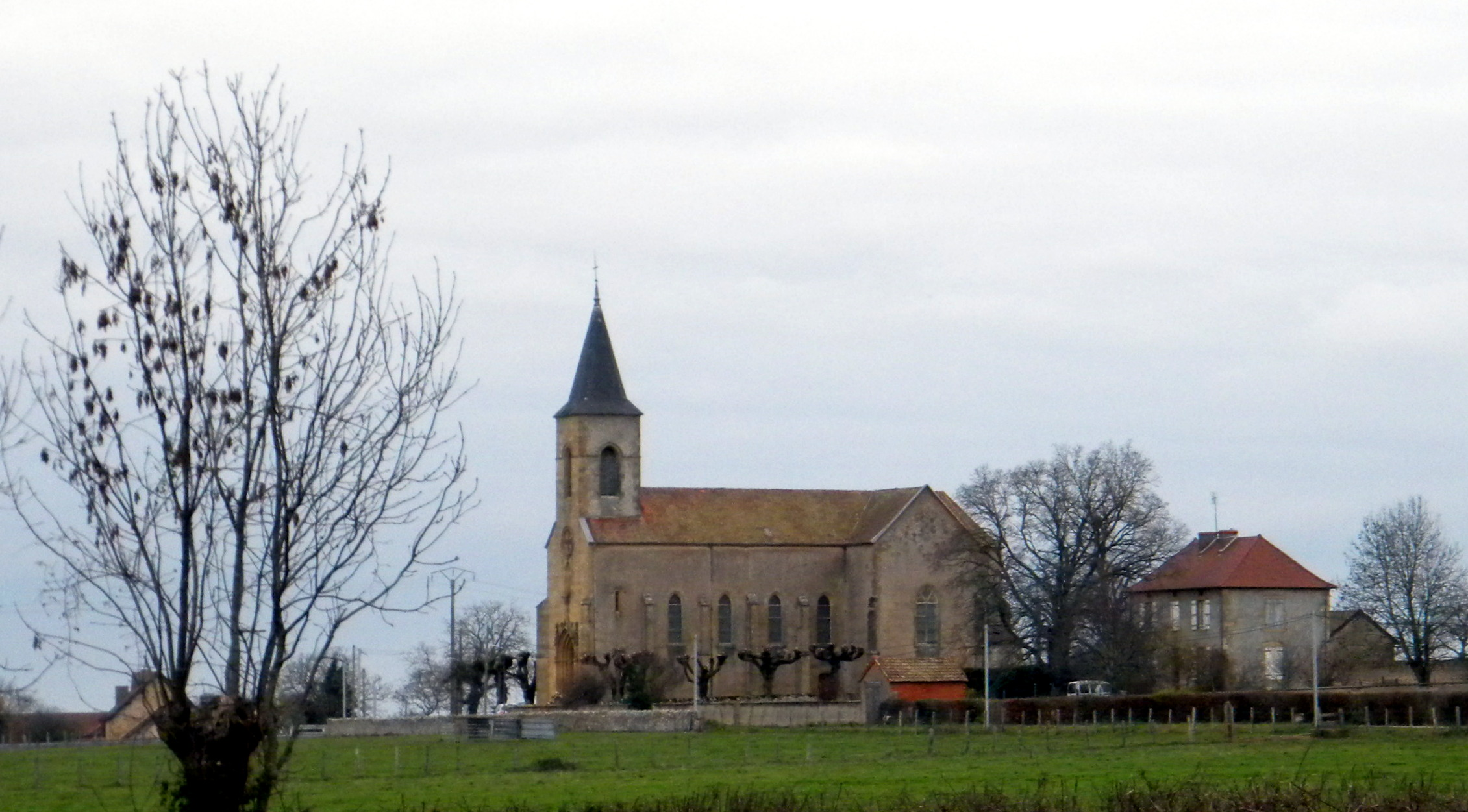 L'église du XIXe s. Sainte-claire de Sainte-Foy